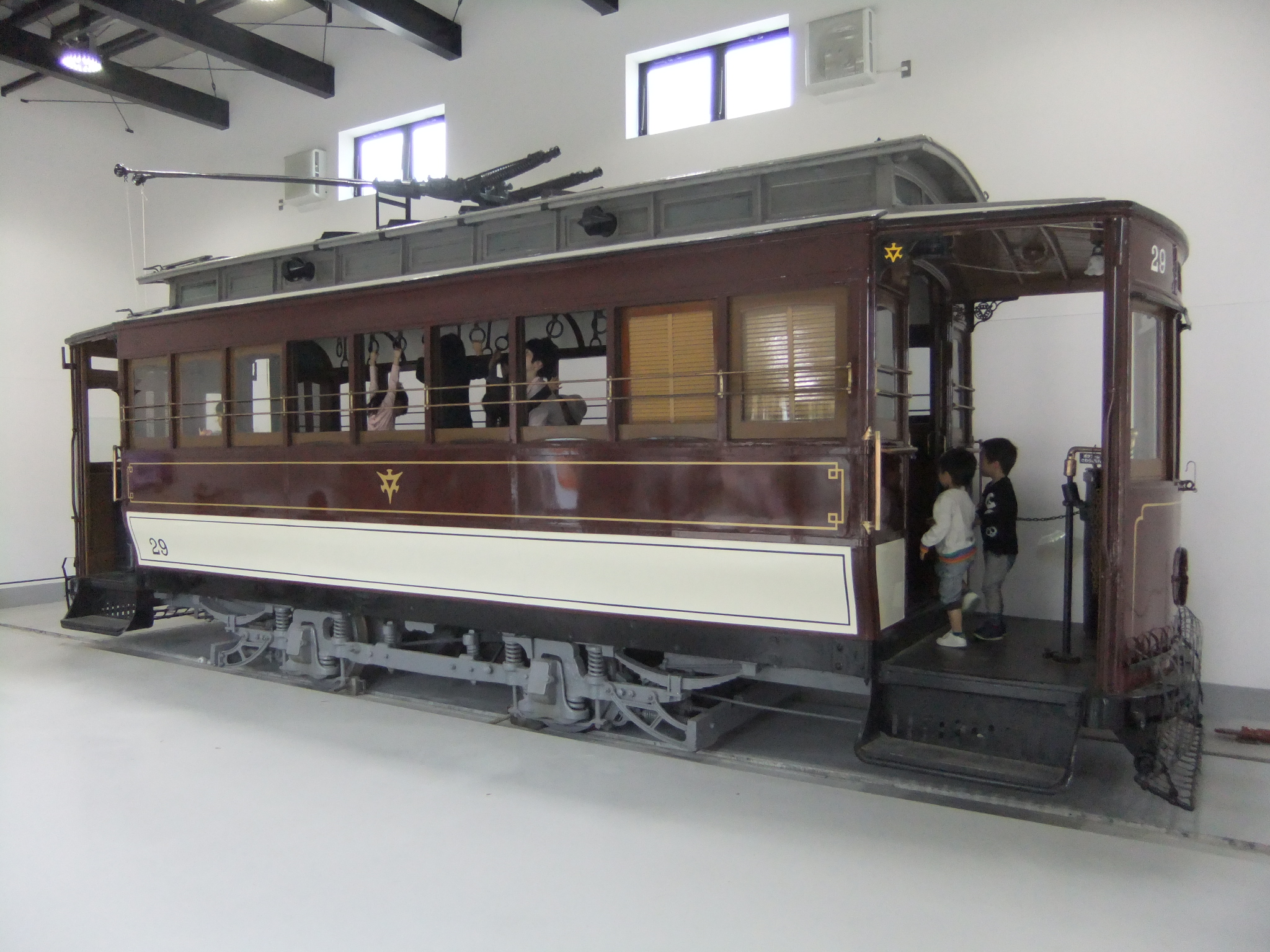 京都市電広軌1型29号(梅小路公園)